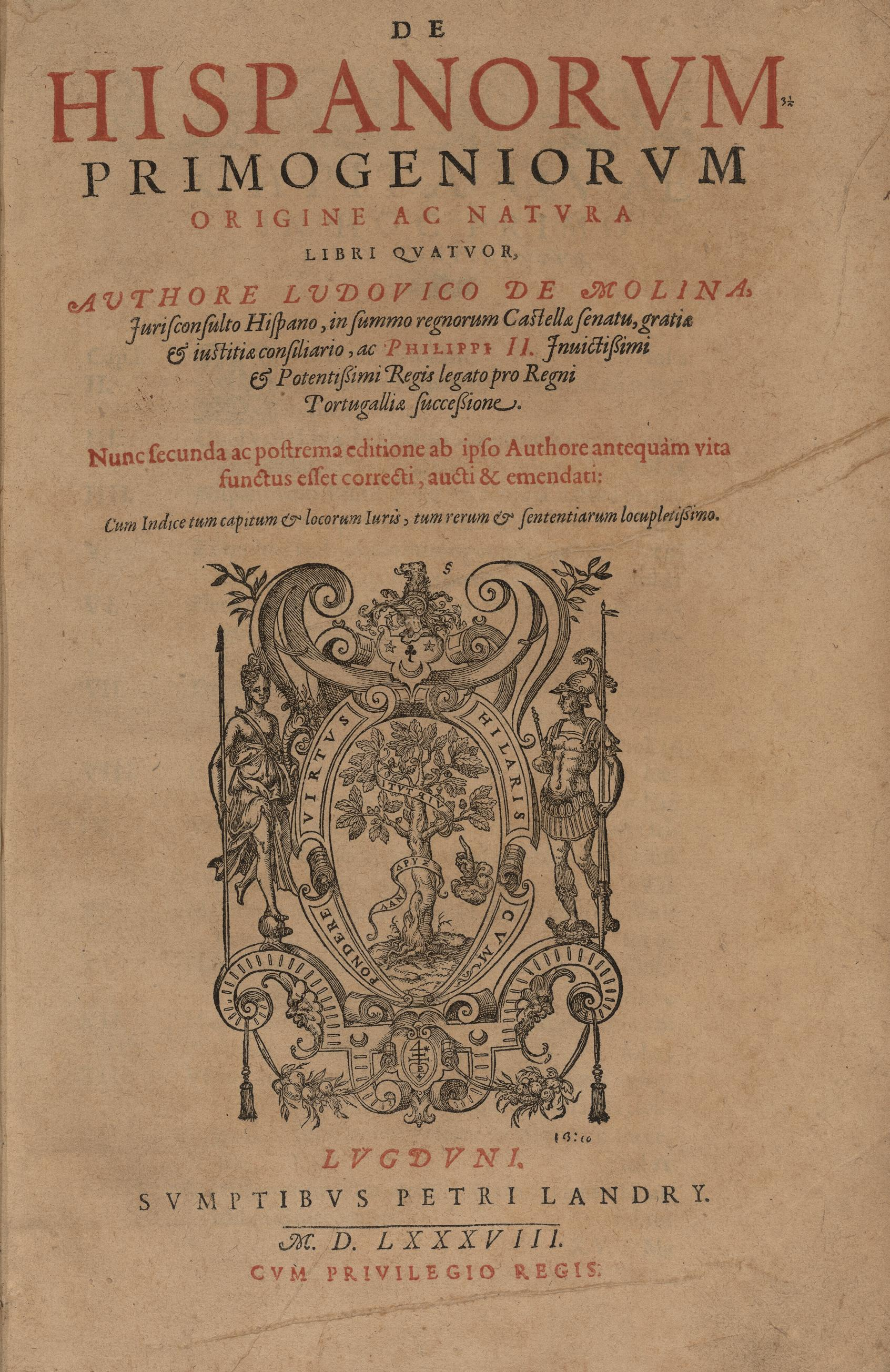 Frontespizio